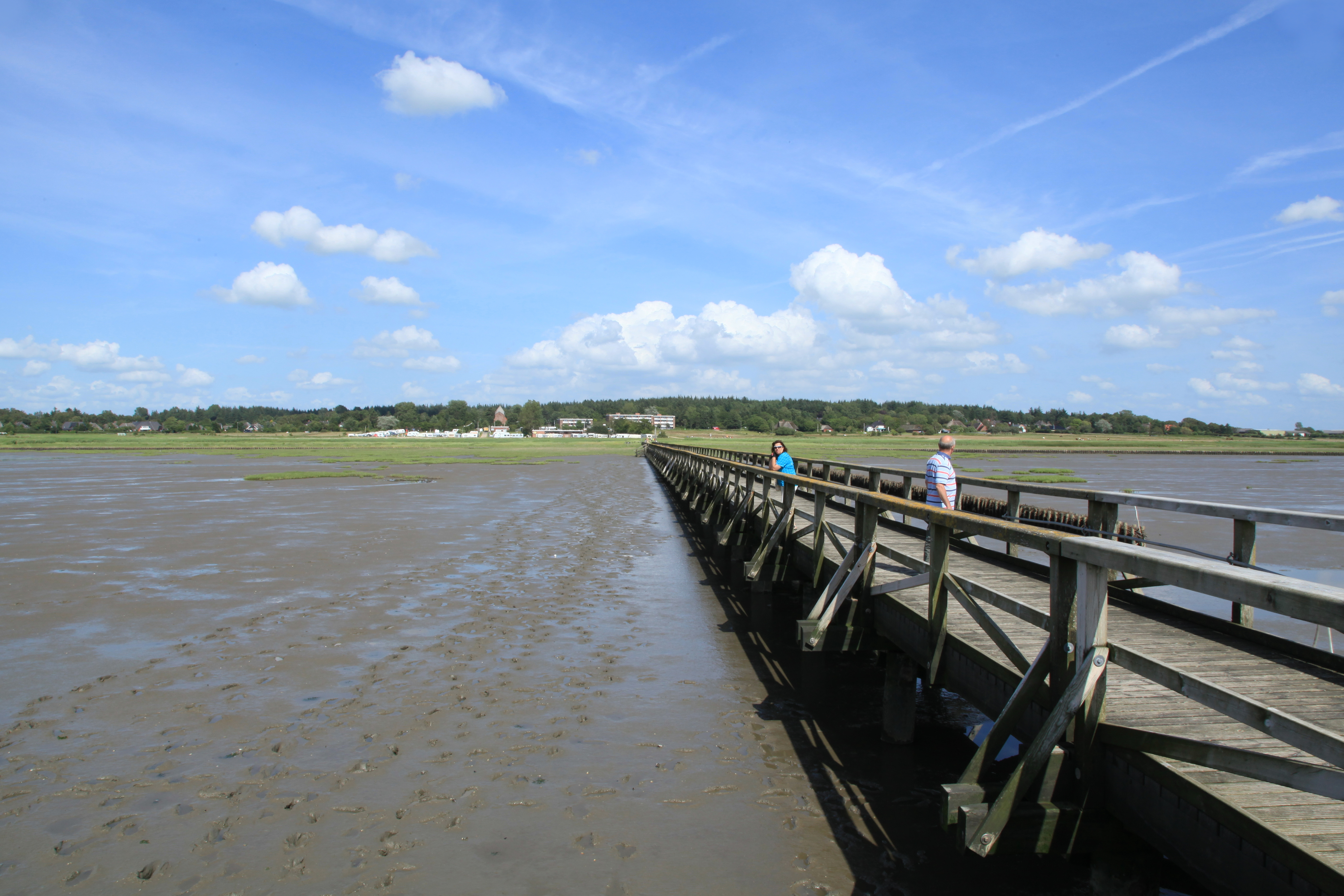 Seebrücke nahe der Nordseestraße in Schobüll, Husum